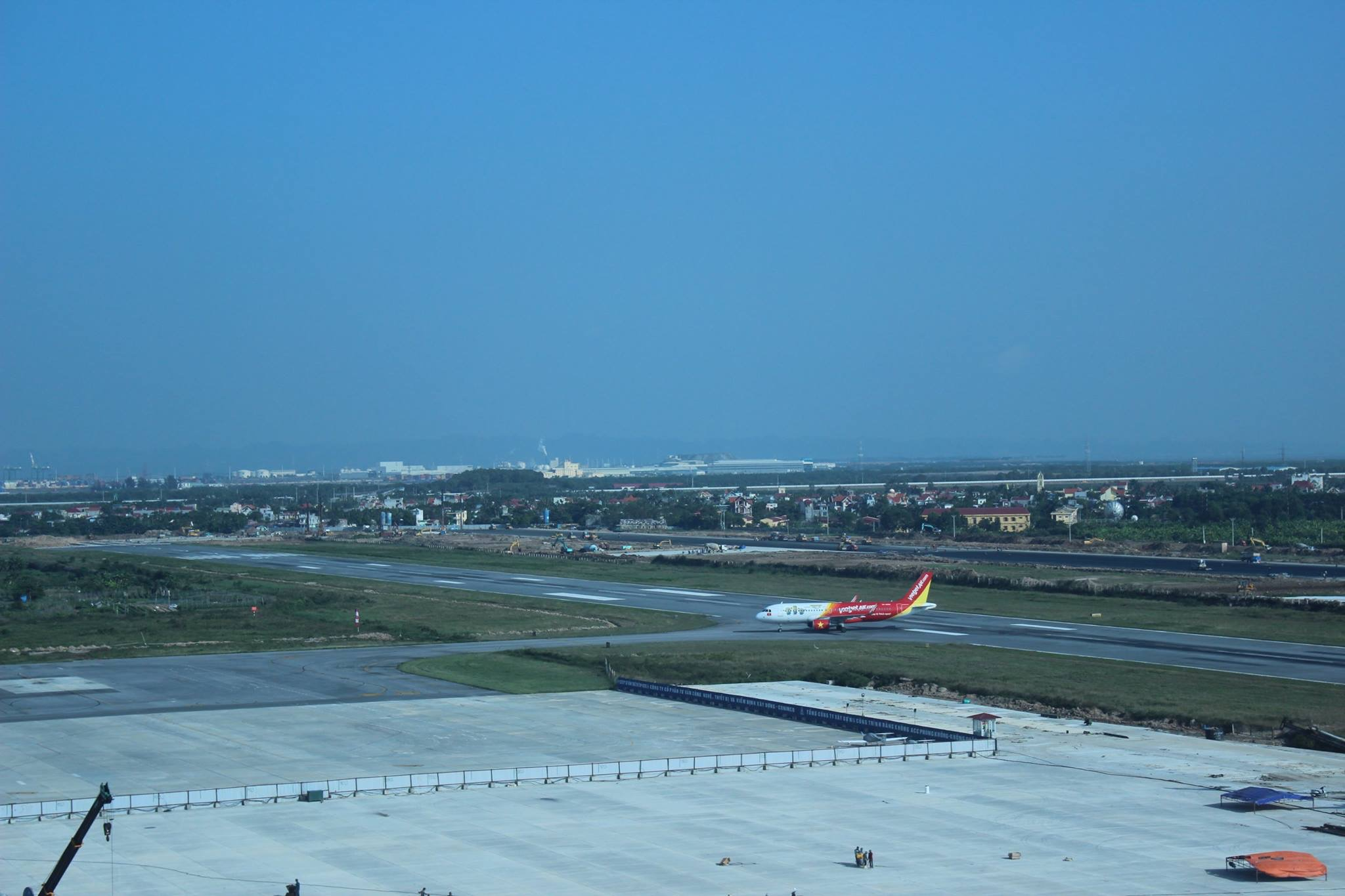 Sân đậu tàu bay mới nhìn từ phía Đài Kiểm soát không lưu (mới)